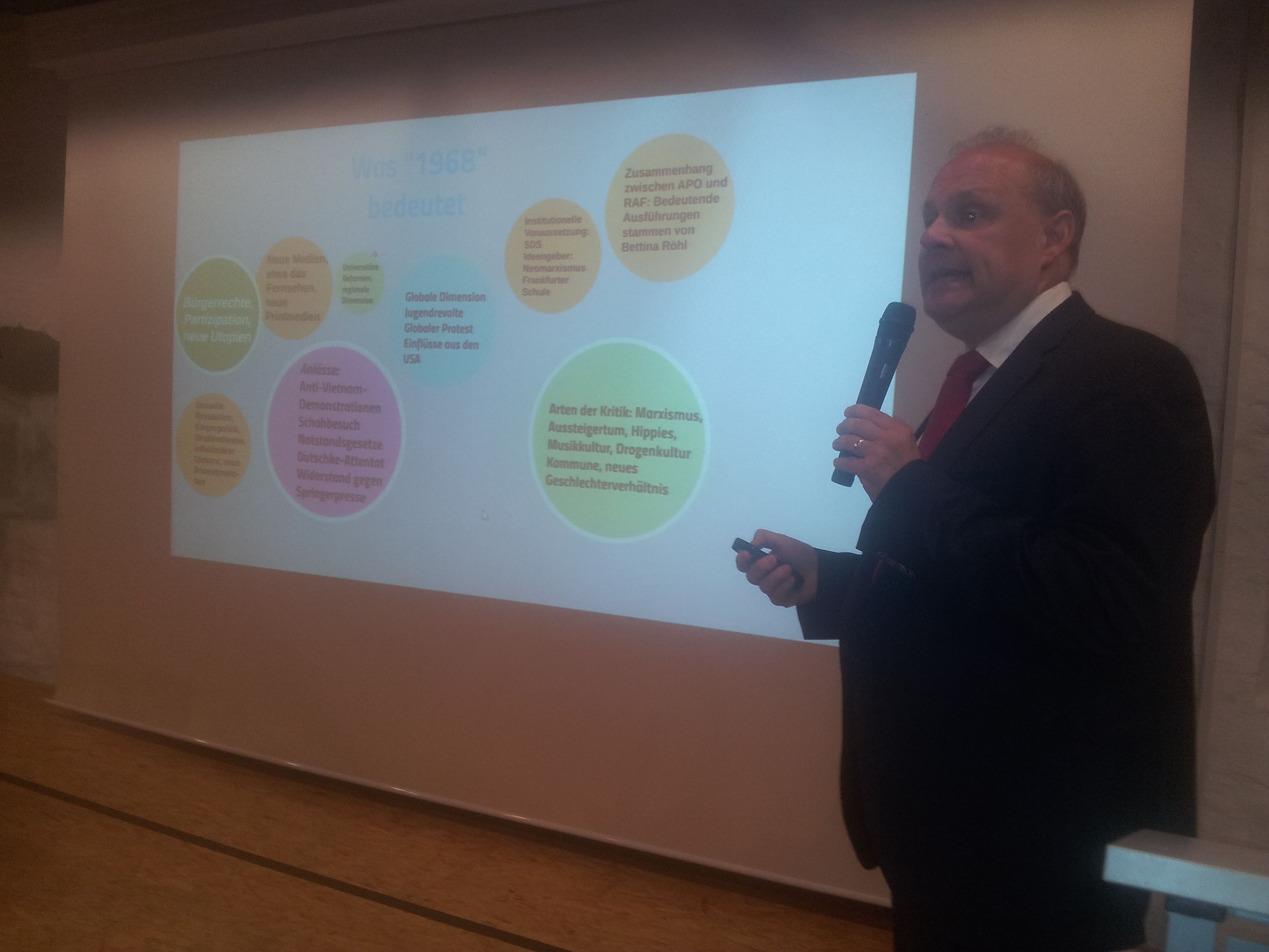 Prof. Dr. Felix Dirsch während eines Vortrages am 16.06.2018 in Ingolstadt mit dem Thema "1968 und 50 Jahre danach"